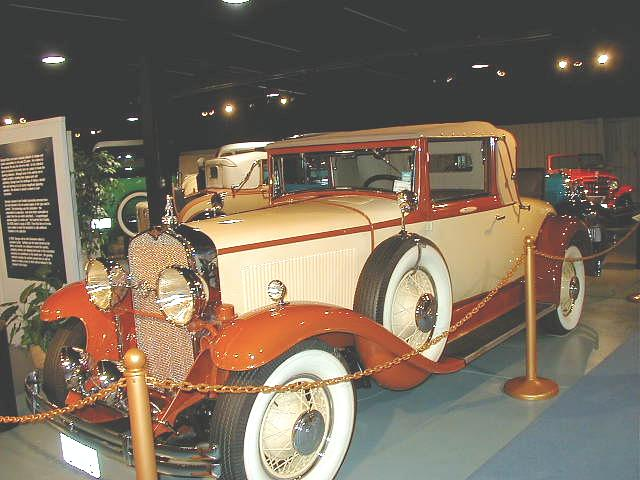 La Salle 1930 Series 340 Convertible Coupe.